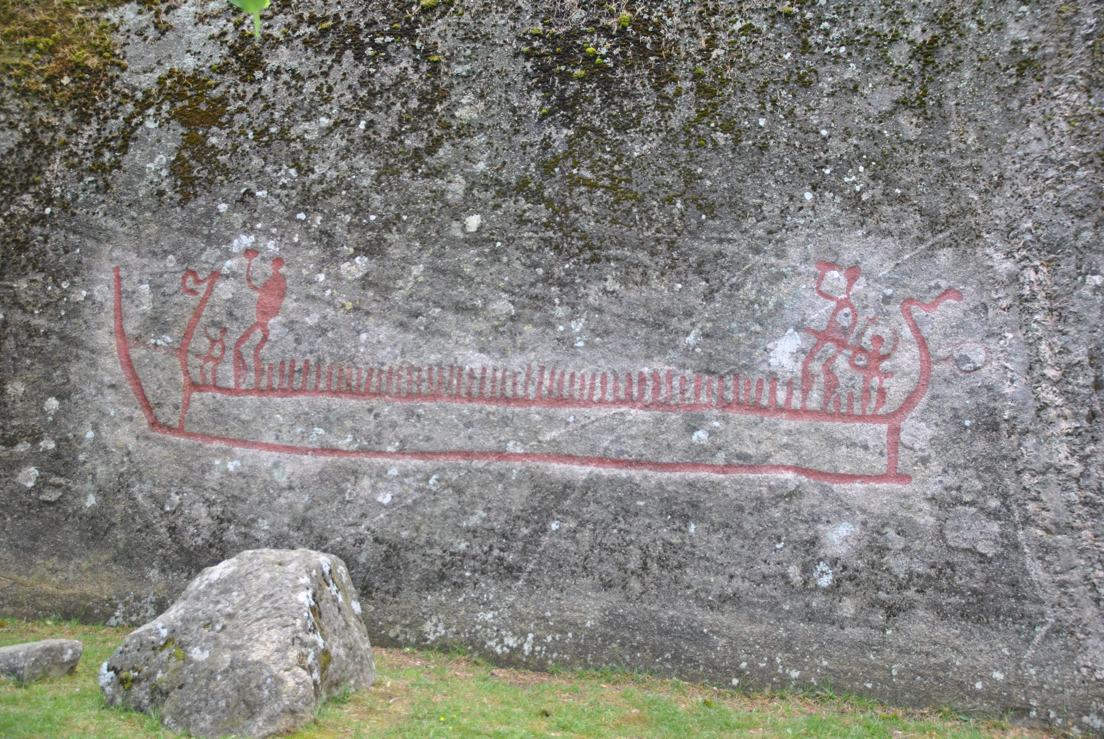 Helleristningen Bjørnstadskipet i Skjeberg.